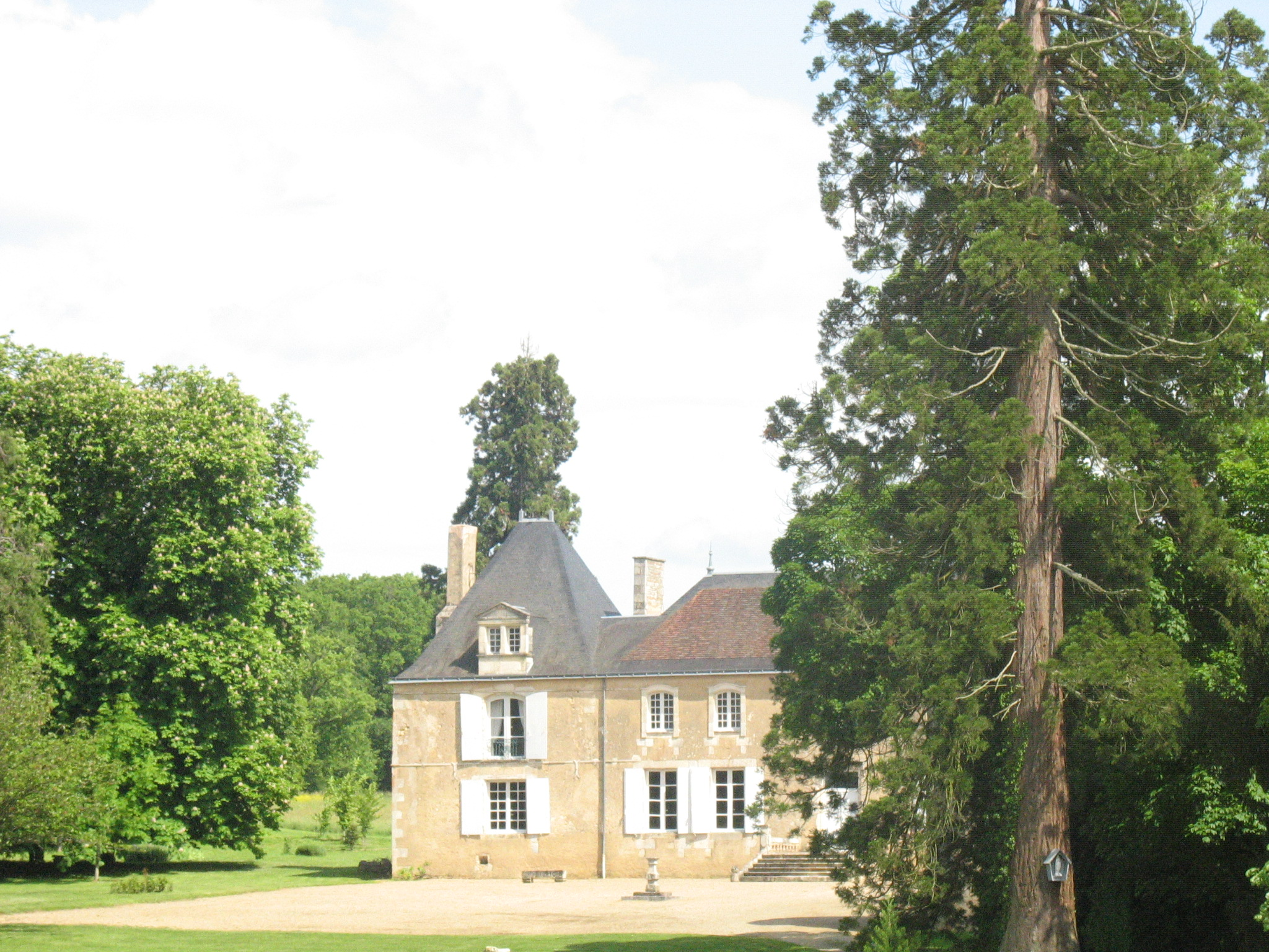 Logis de La Cigogne, (Inscrit, 1986)